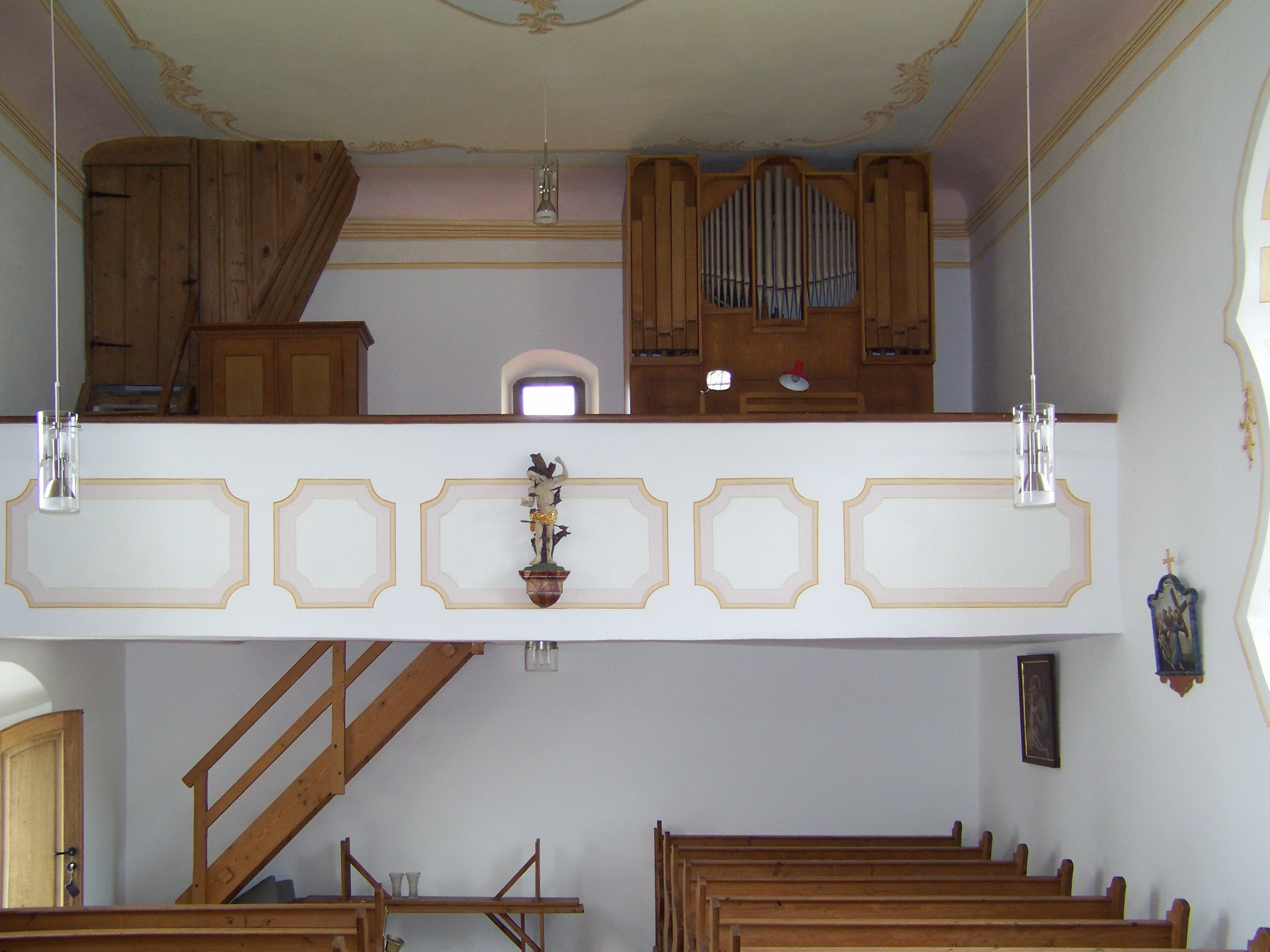 Bayerbach, Pram, Haus Nr. 9. Filialkirche St. Martin und Nikolaus. Saalkirche, von 1758, Apsis romanisch, mit kleinem Turm über der Apsis, mit Achteckaufsatz und Zwiebelkuppel; mit Ausstattung. Westempore.